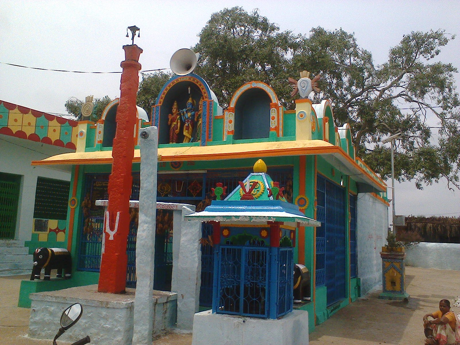 శ్రీకృష్ణస్వామి దేవాలయం, సద్దలోనిపల్లి